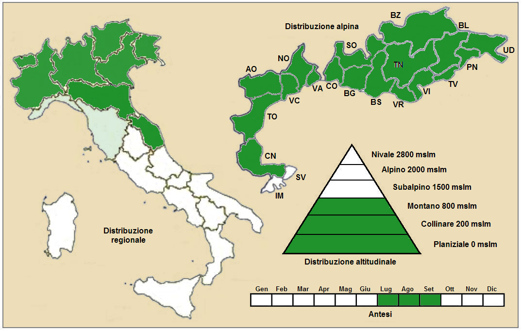 ASTER AMELLUS - Distribuzione